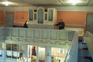 Lütkemüller-Orgel in der Schinkelkirche Wuthenow